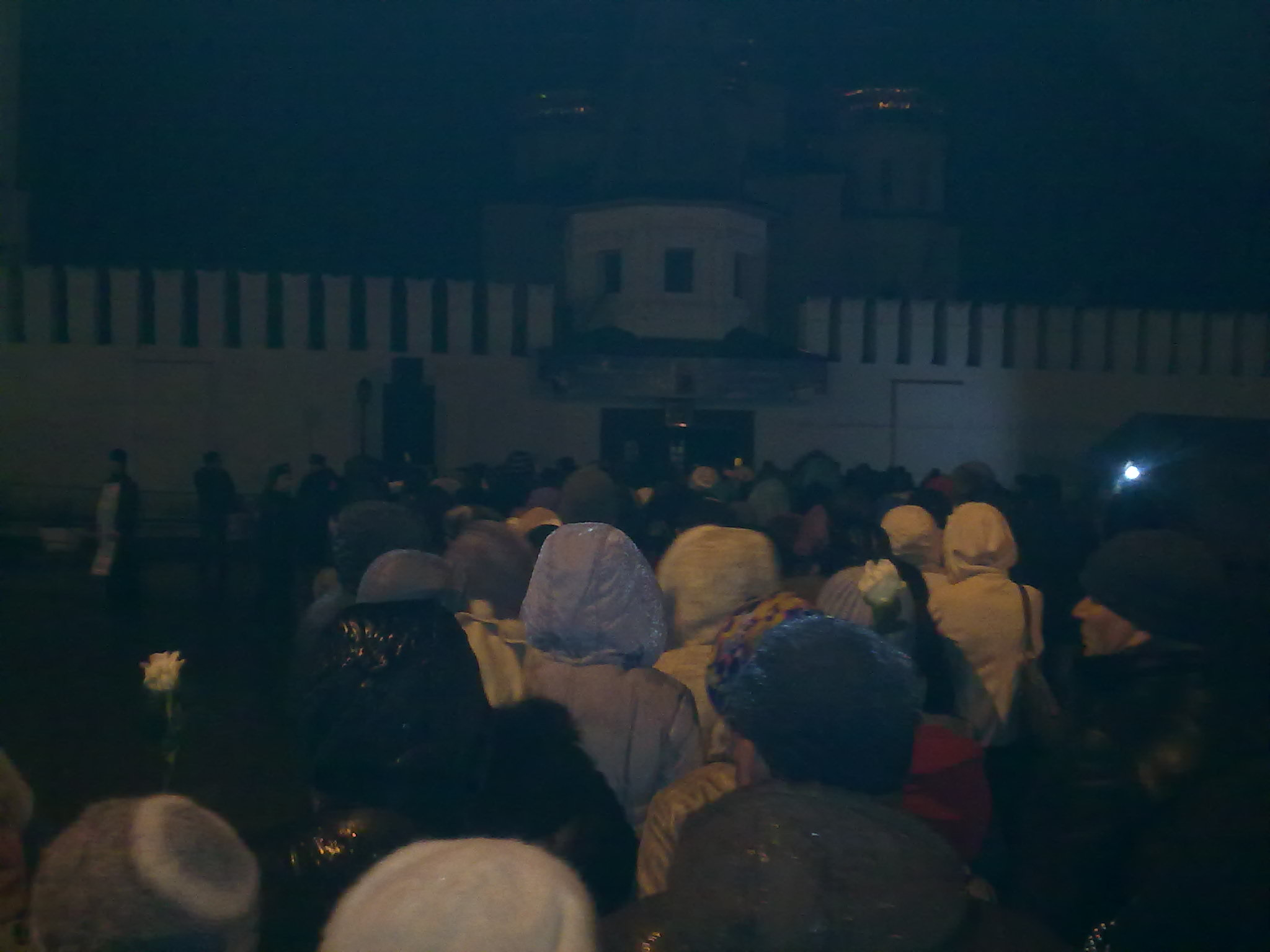 Очередь к Поясу Пресвятой Богородицы в Тюмени в ночь с 3 на 4 ноября 2011 года, около 00:12